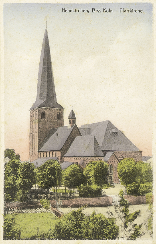 Saint Margareta Neunkirchen-eastern view (1914)